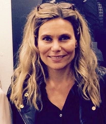 Angelika Braun, writer from Sweden.